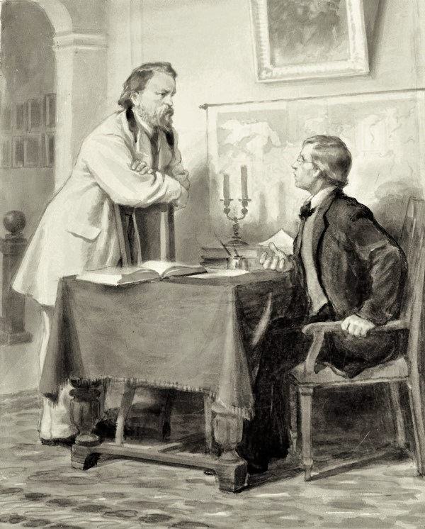 Černyševskij a Londra da Herzen, aquerello su carta. L'opera è conservata al Museo statale di storia locale di Astrachan'